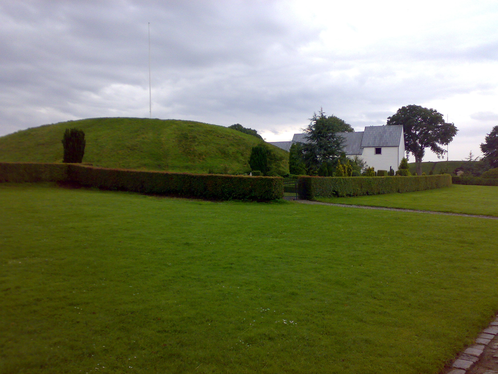 Jelling church, Denmark